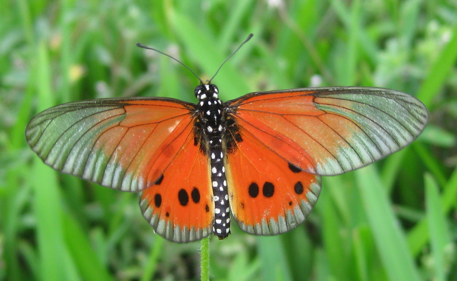 Dusky-veined acraea (Acraea igola), taken in Pemba, Cabo Delgado, MZ.